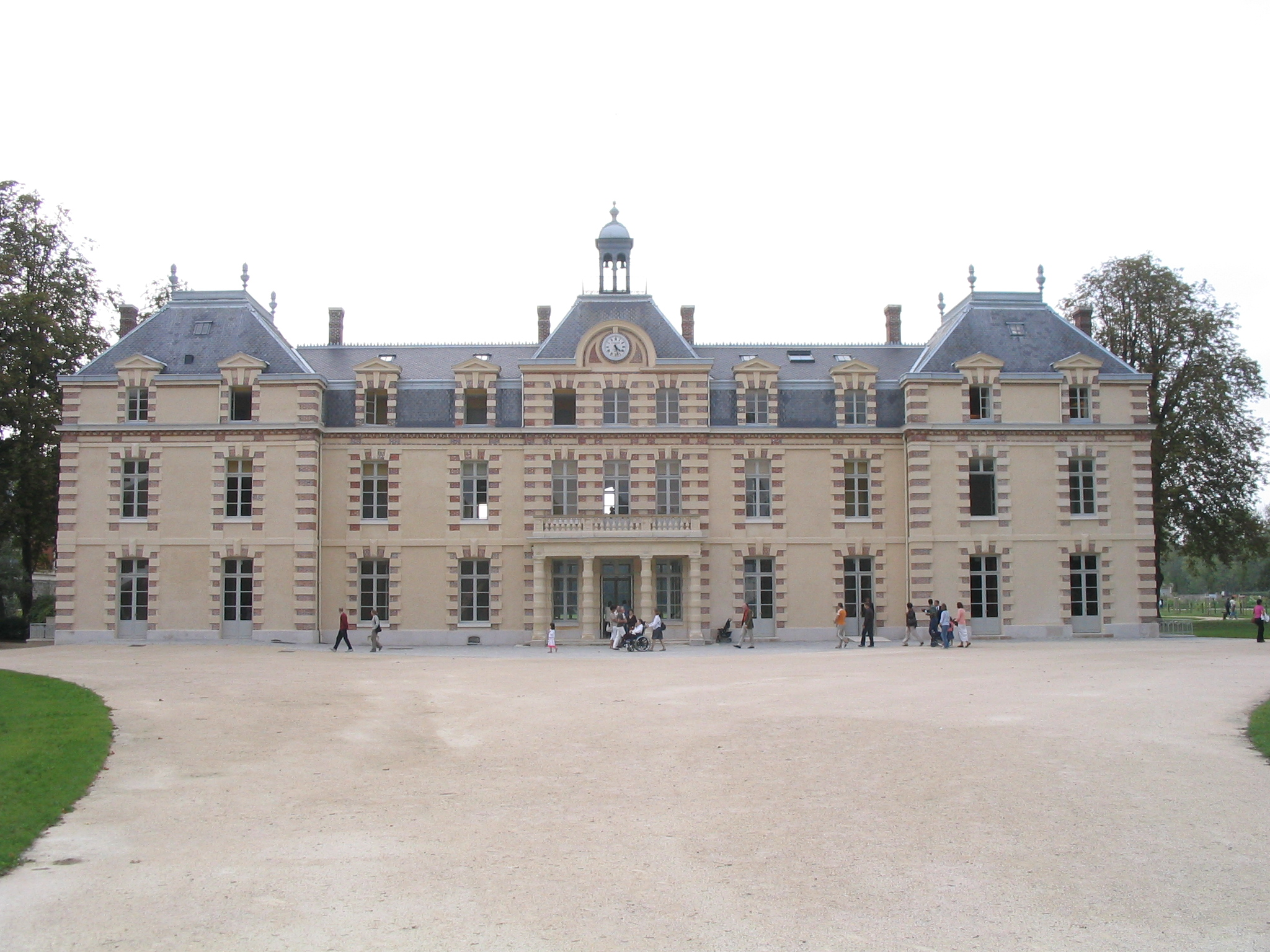 Le château de la Grange la Prévôté à Savigny-le-Temple. Autor:Tej